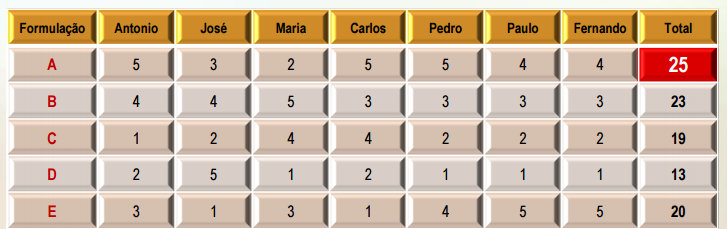 Tabela explicando a etapa de votação da técnica de grupo nominal na organização